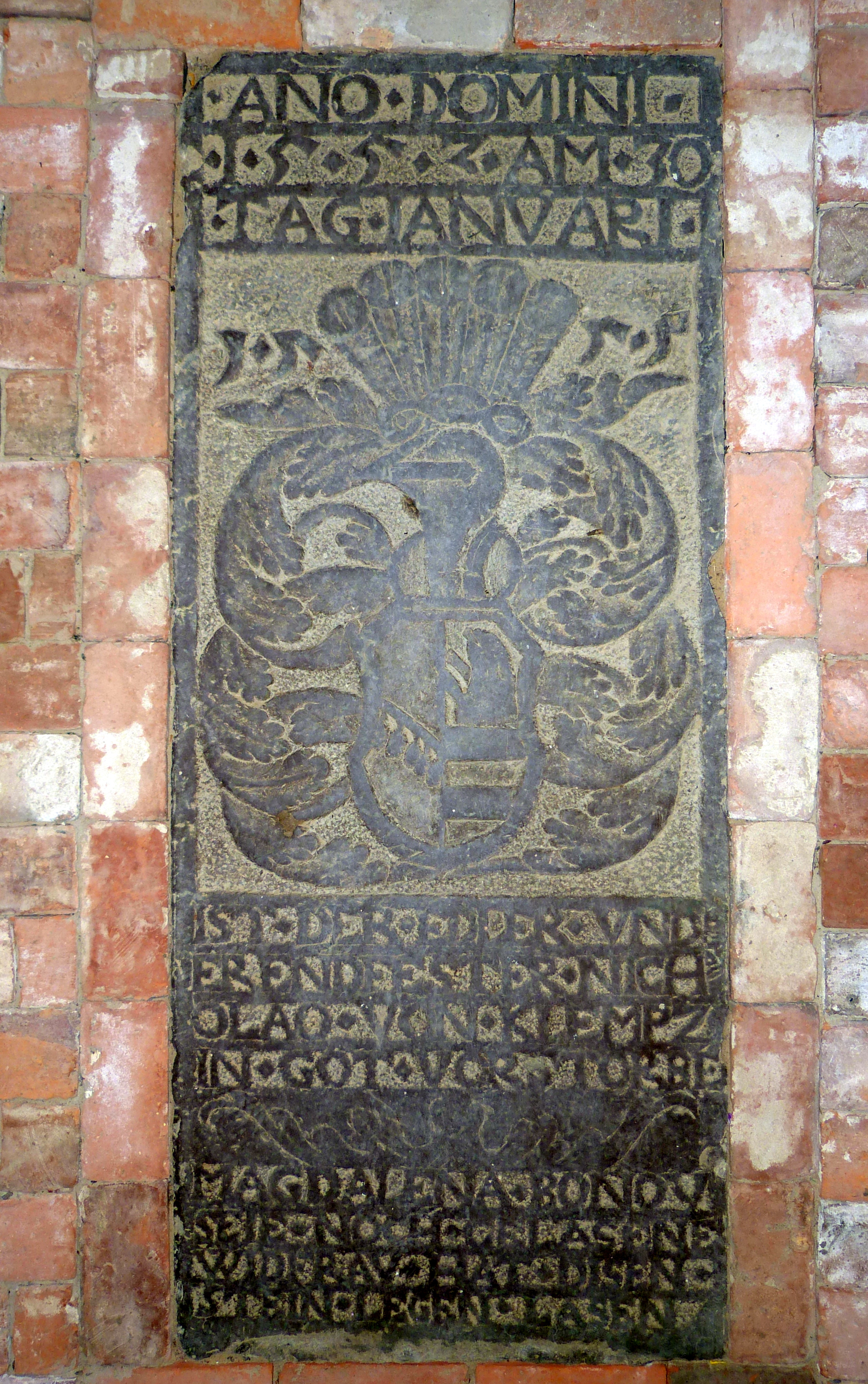 Kirche in Pinnow, Murchin, Gedenktafel für Nicolaus von Klemptzen im Fussboden der Kirche